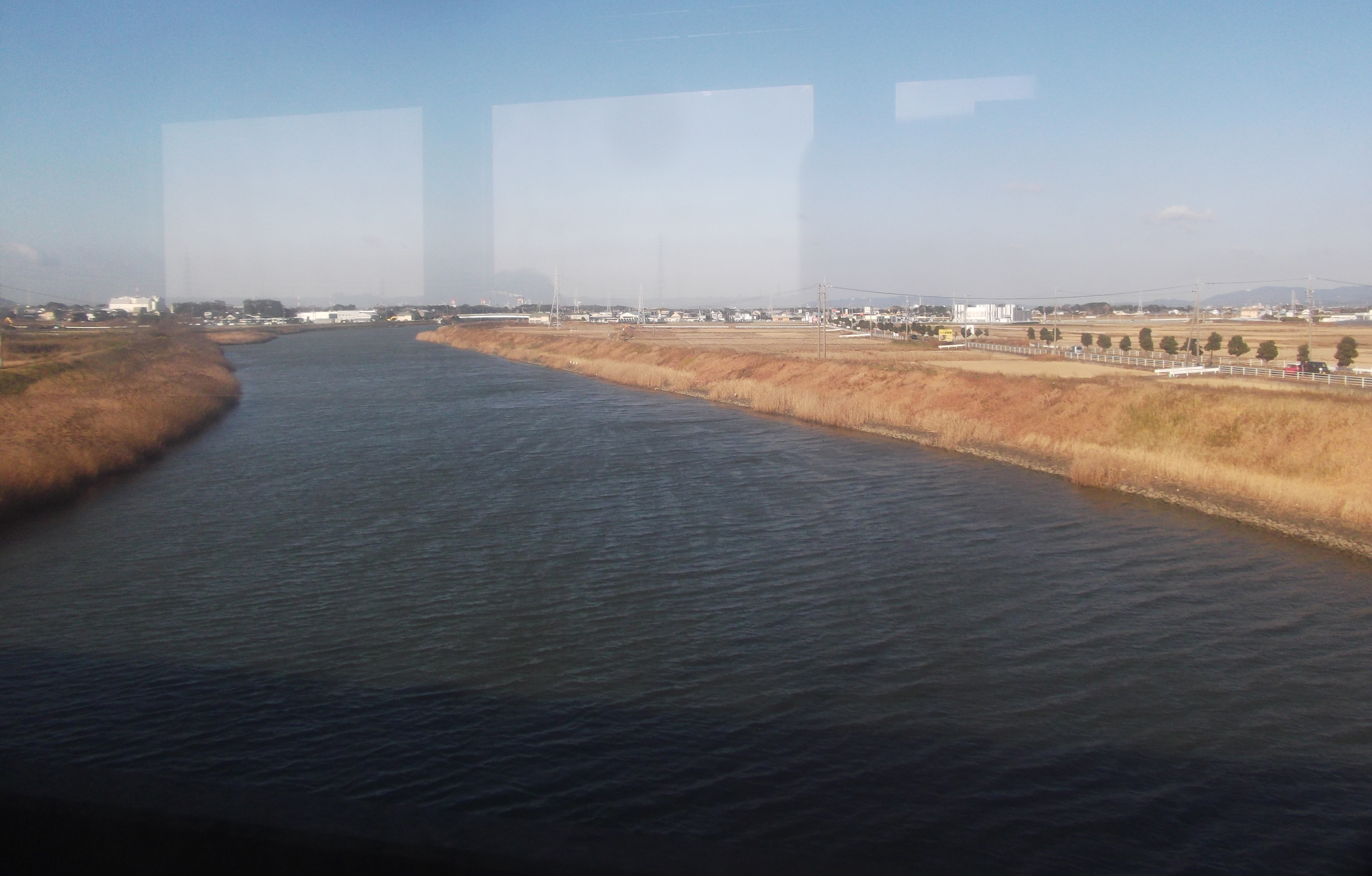 愛知県豊橋市、梅田川。渥美線の車内より撮影。